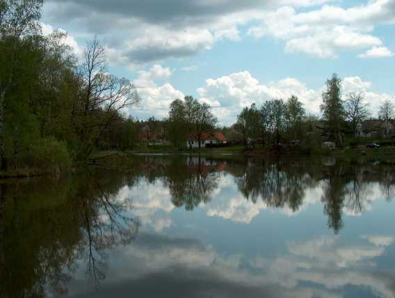 Vlachnovický rybník